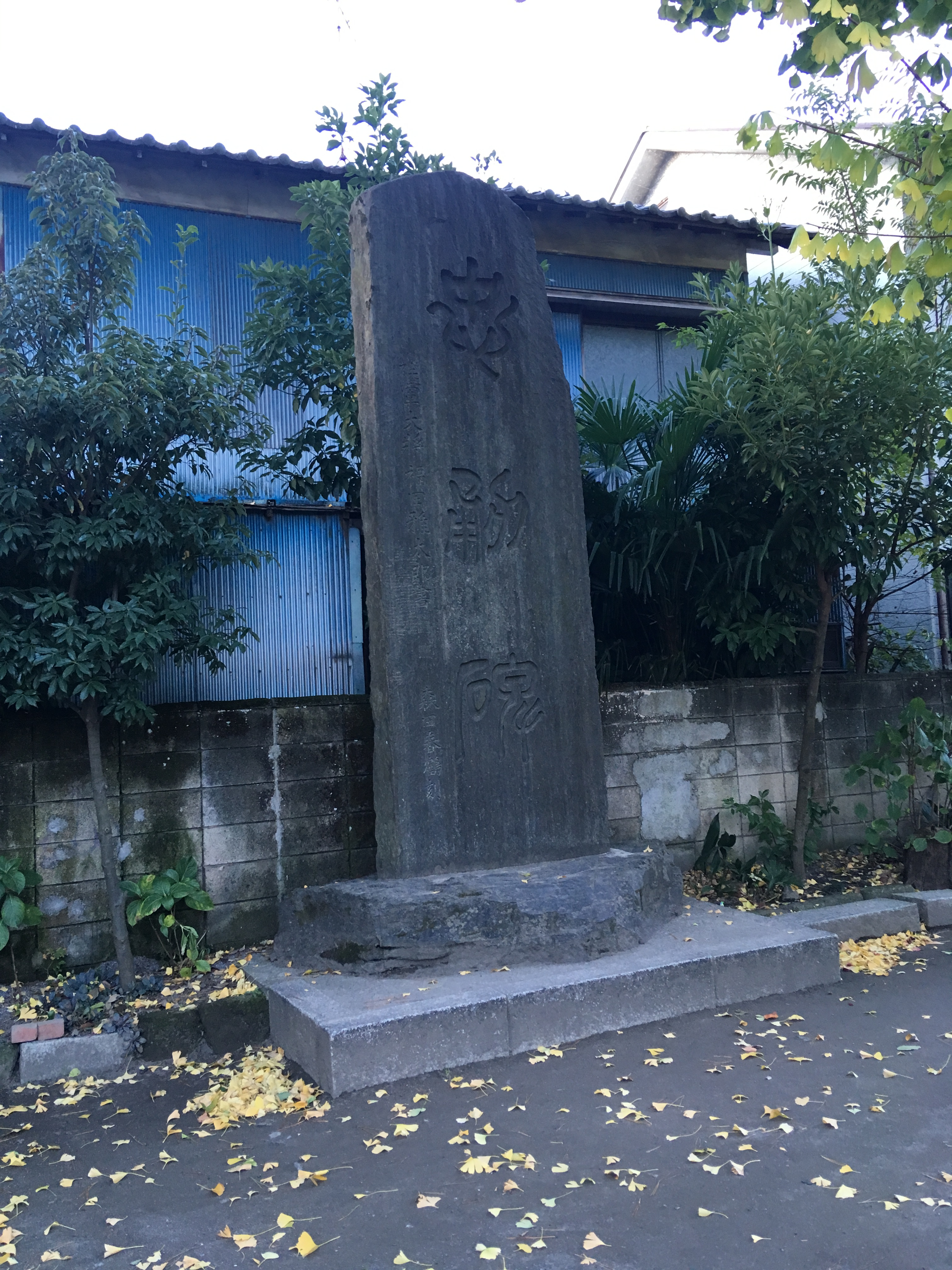 本田町役場の傍らにあった昭和４年秋建立の"忠勈碑 (ちゅうゆうひ) "。現在は立石熊野神社に移設されている。